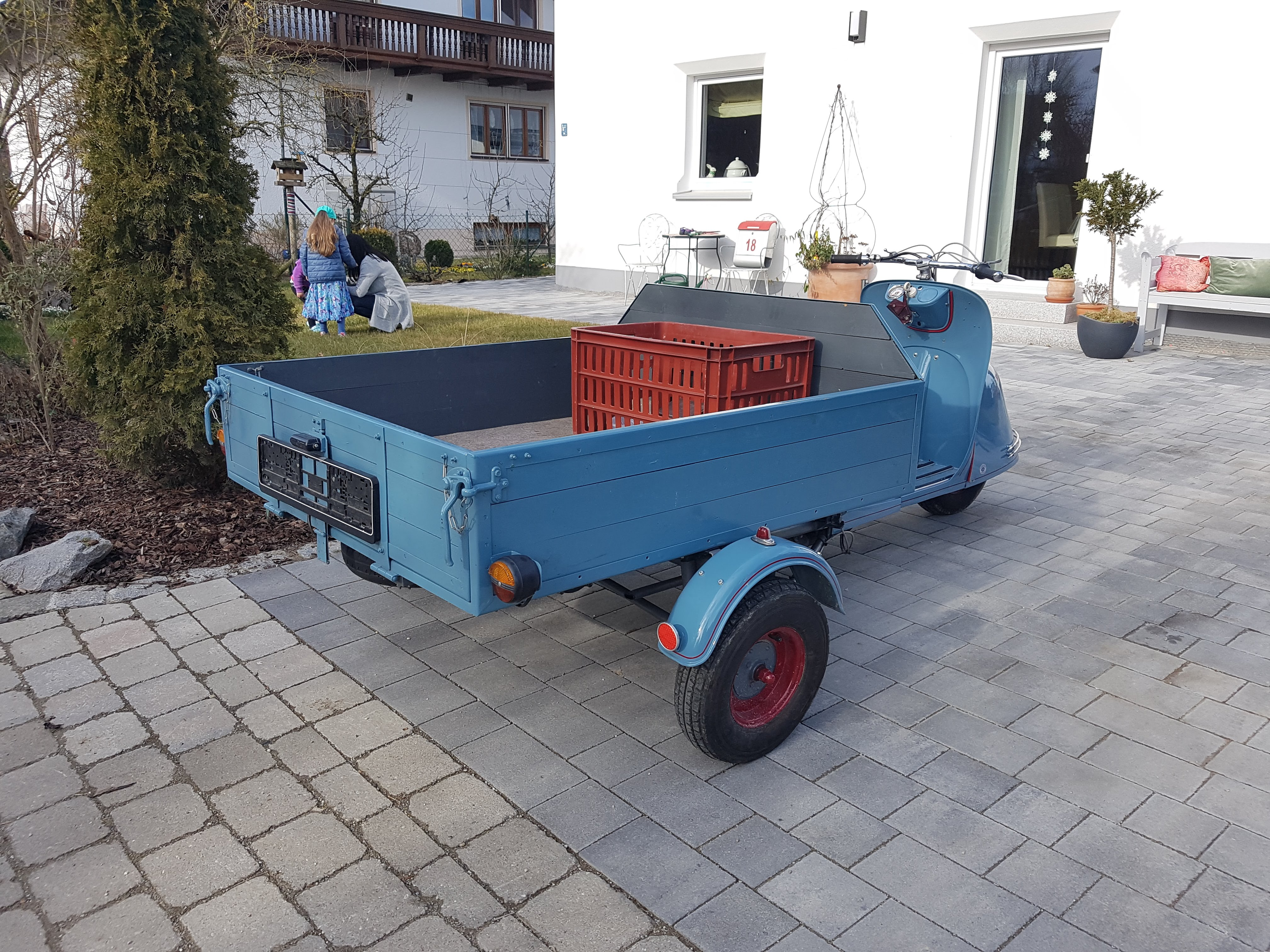 GLAS Goggo Lastenroller Seitenansicht